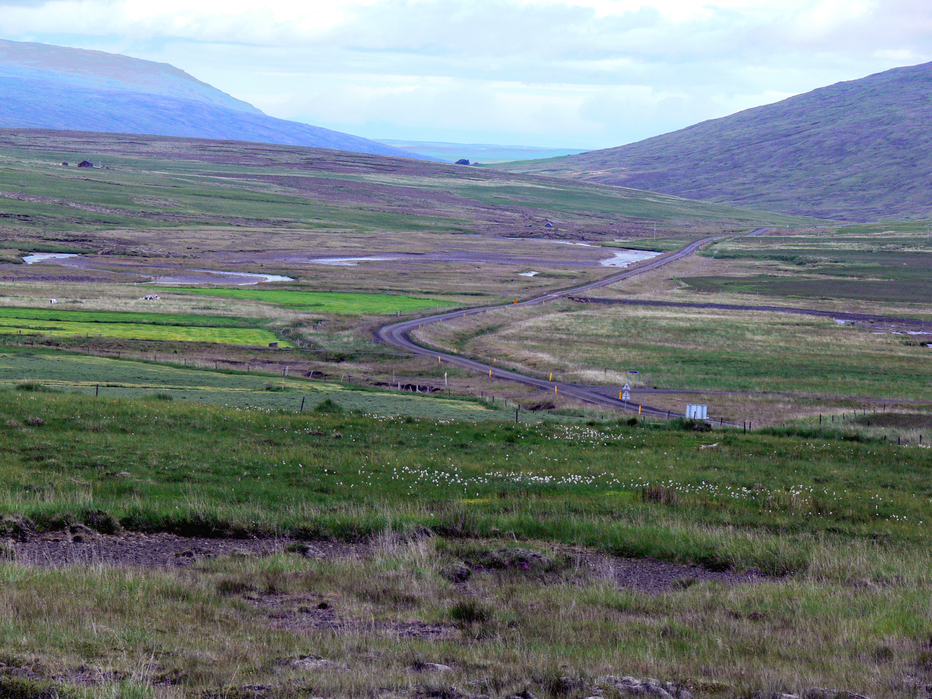 Lundareykjudalur